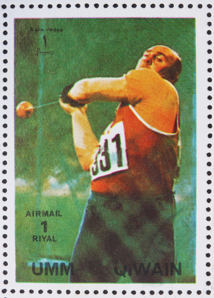 Anatoliy Bondarchuk